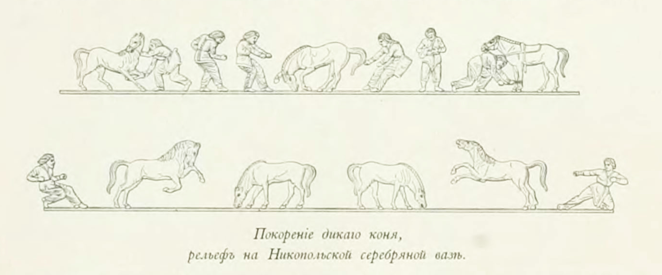 Великокняжеская, царская и императорская охота на Руси